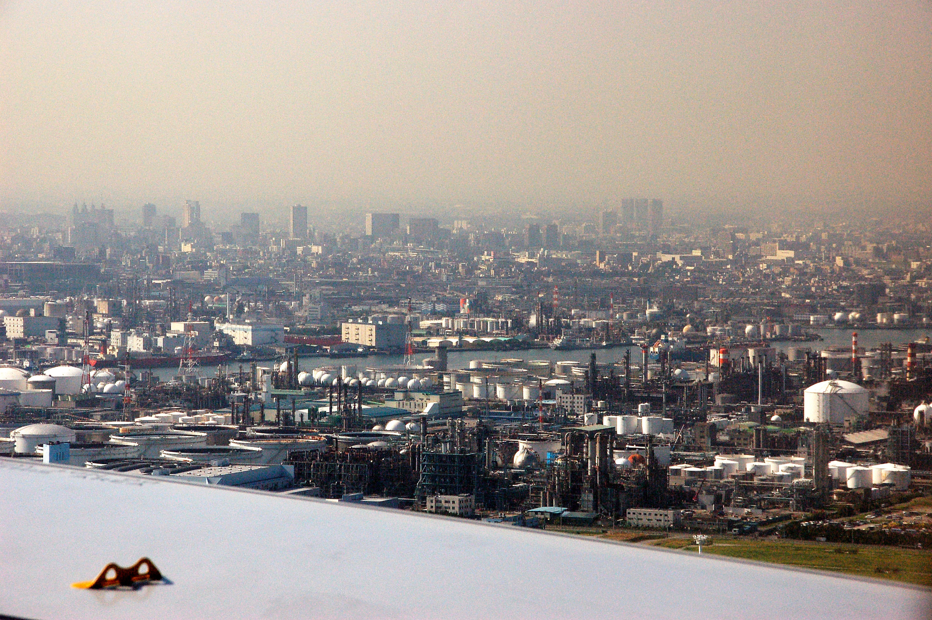 Ukishima ~ Chidori, Kawasaki-ku, Kawasaki, Kanagawa Prefecture, Japan